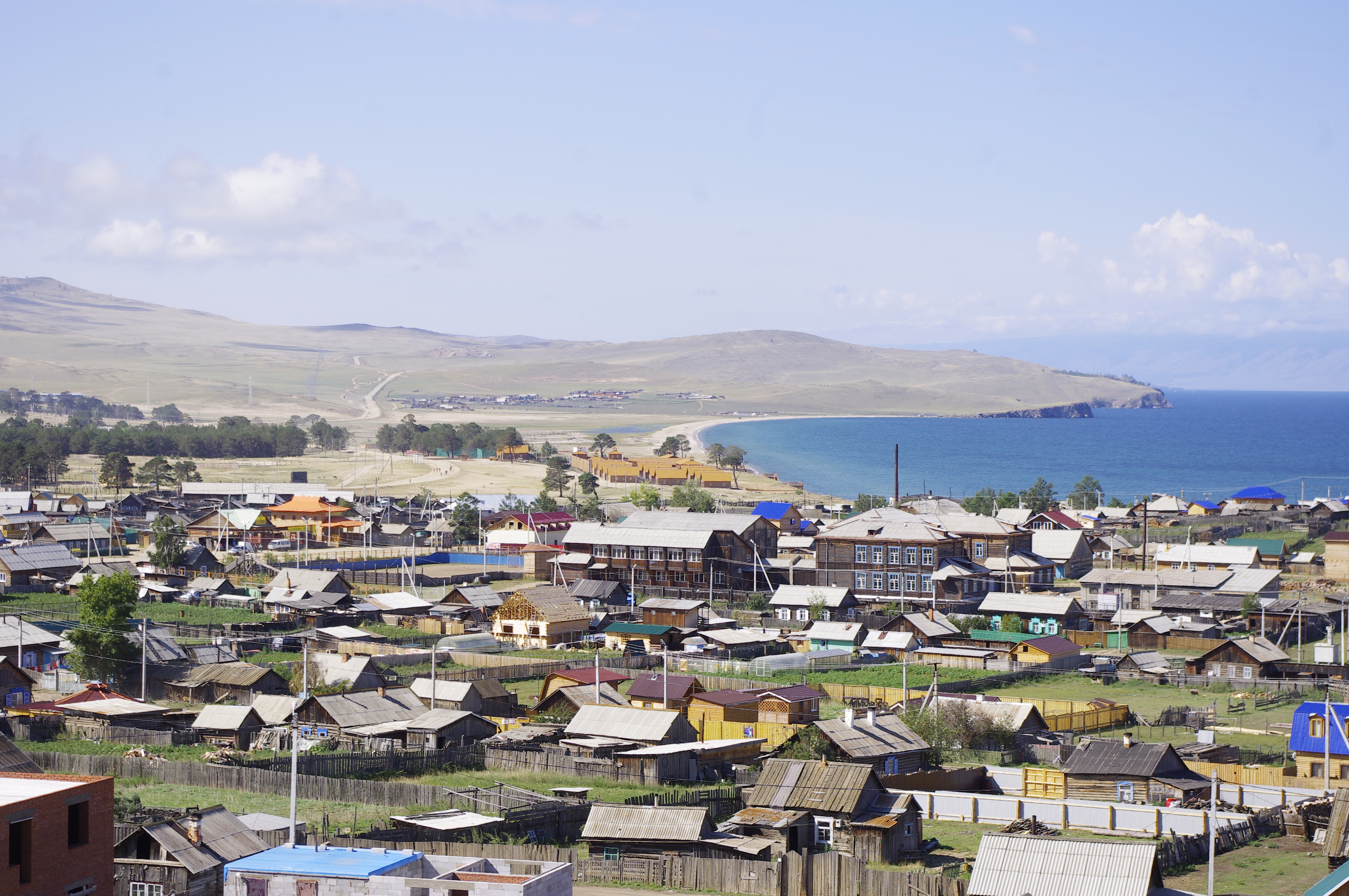 Stolica wyspy Olchon, lato 2013.